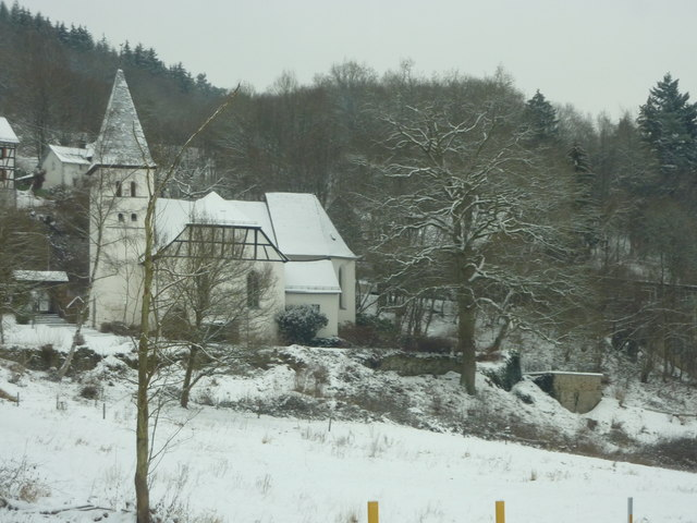 Kirche in Kirchähr, Gelbachtal. Naturpark Nassau.